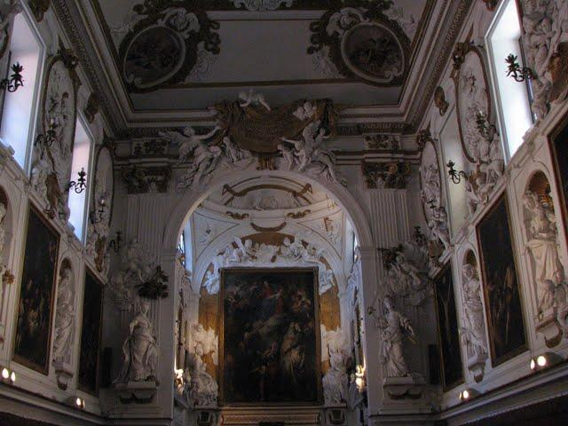 Oratorio del Rosario in San Domenico a Palermo, impreziosito dagli stucchi di Giacomo Serpotta. Sull'altare il dipinto: La Madonna del Rosario e Santi di Antoon van Dyck.